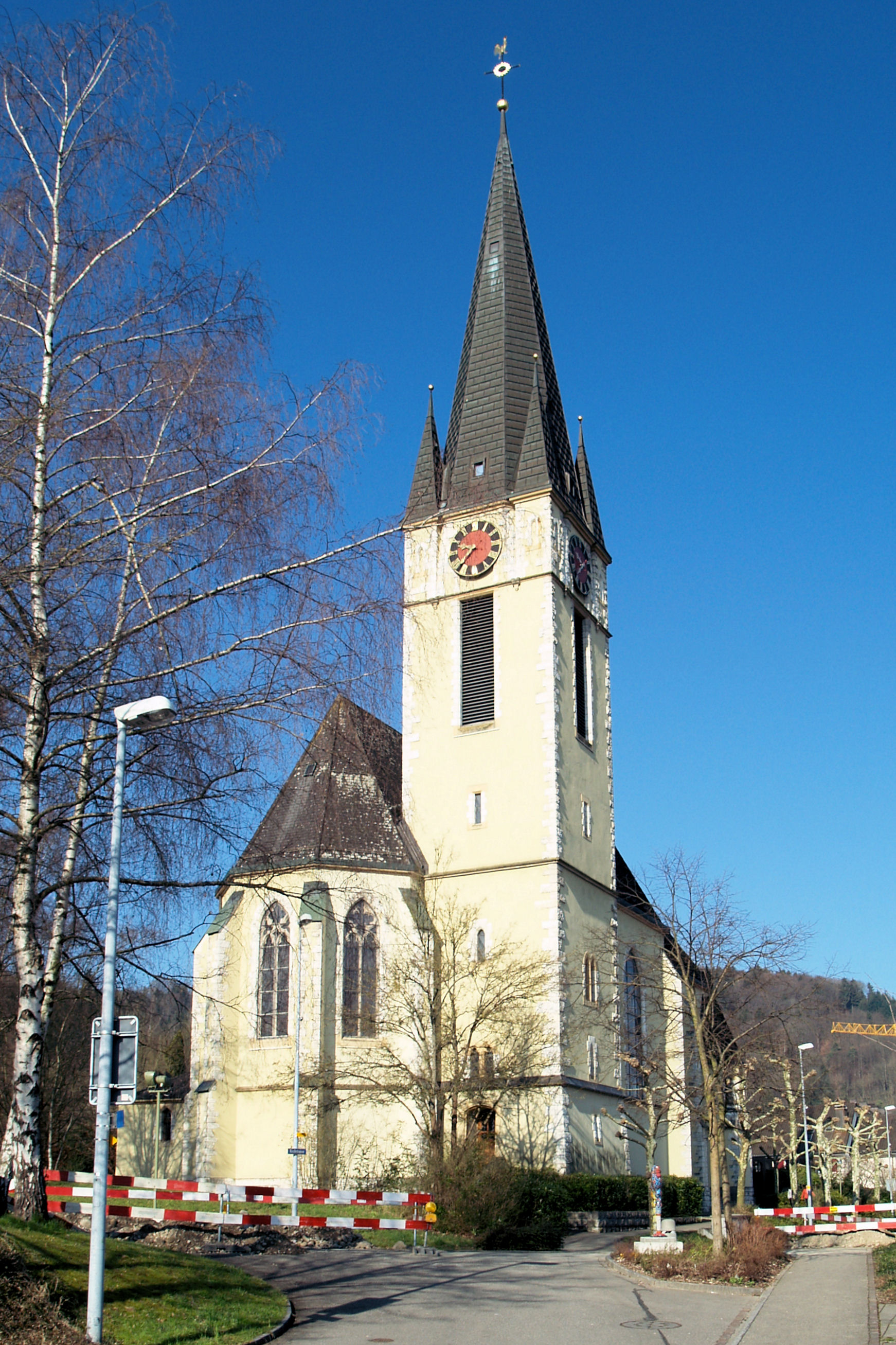 Neue katholische Kirche von Spreitenbach (Kanton Aargau). Baujahr 1903/1904